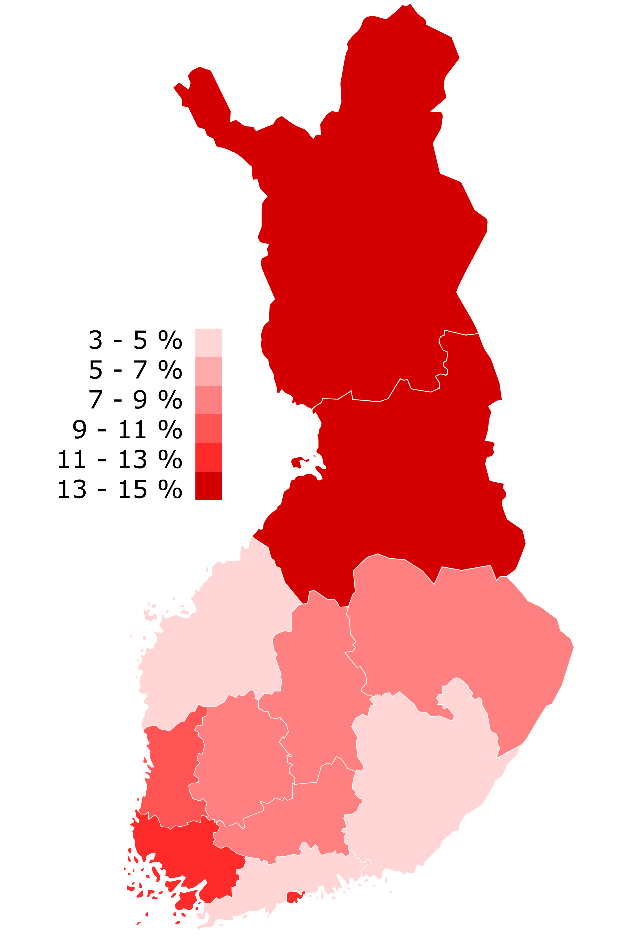 Vasemmistoliiton kannatus eduskuntavaaleissa 2019 vaalipiireittäin. Yhdessäkään vaalipiirissä kannatus ei asetu välille 5–7 %.